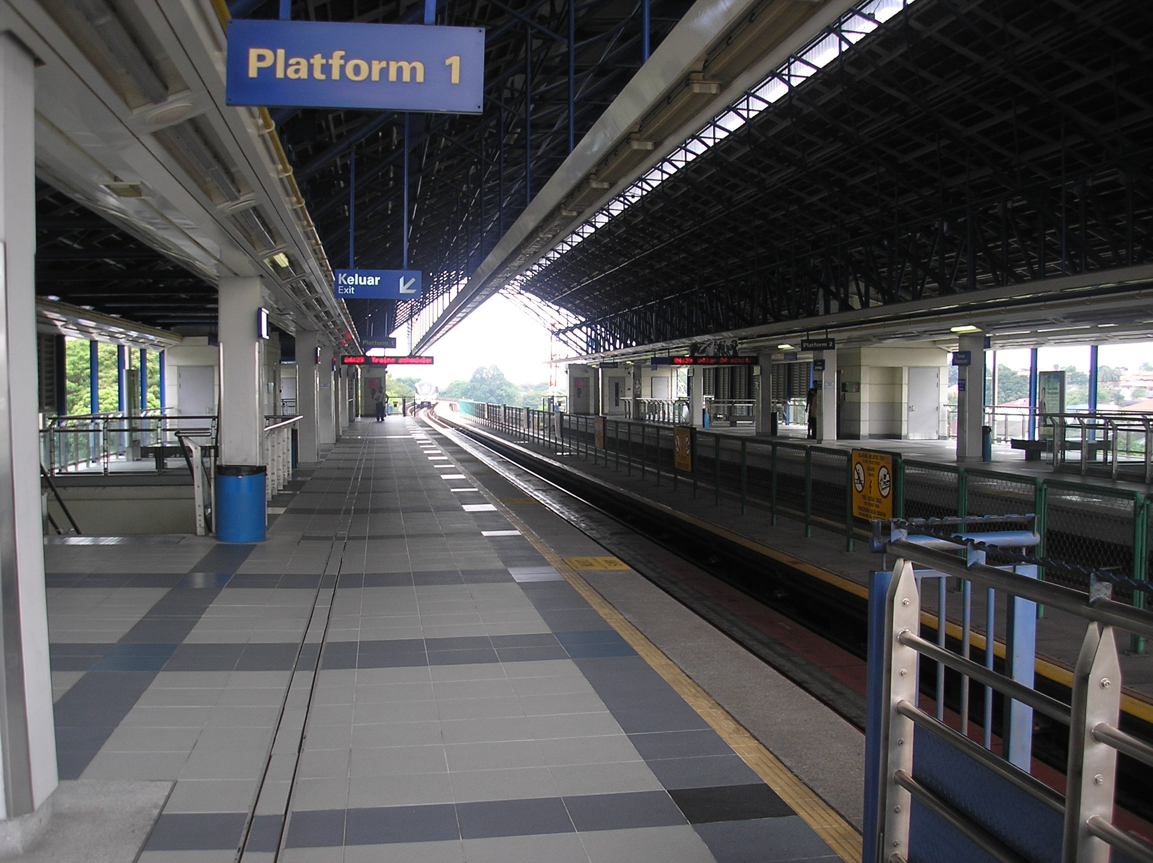 The Taman Paramount LRT station (Kelana Jaya Line), Petaling Jaya, Selangor, Malaysia.